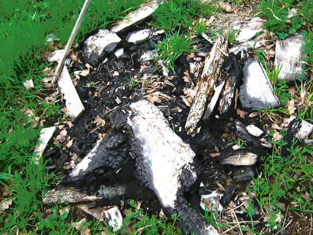 Morceaux de bois en cendres après un feu.